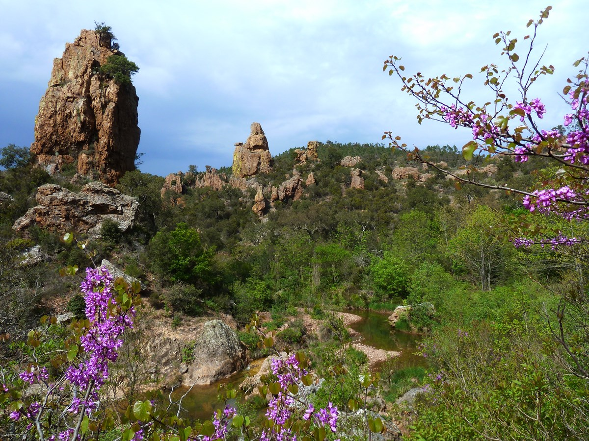 Ravin du Mal Infernet, massif de l'Esterel, Var, France